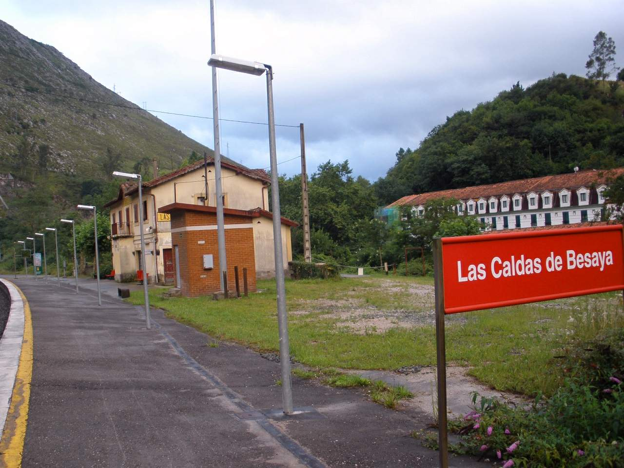 Estación de Adif de Las Caldas de Besaya (Cantabria)